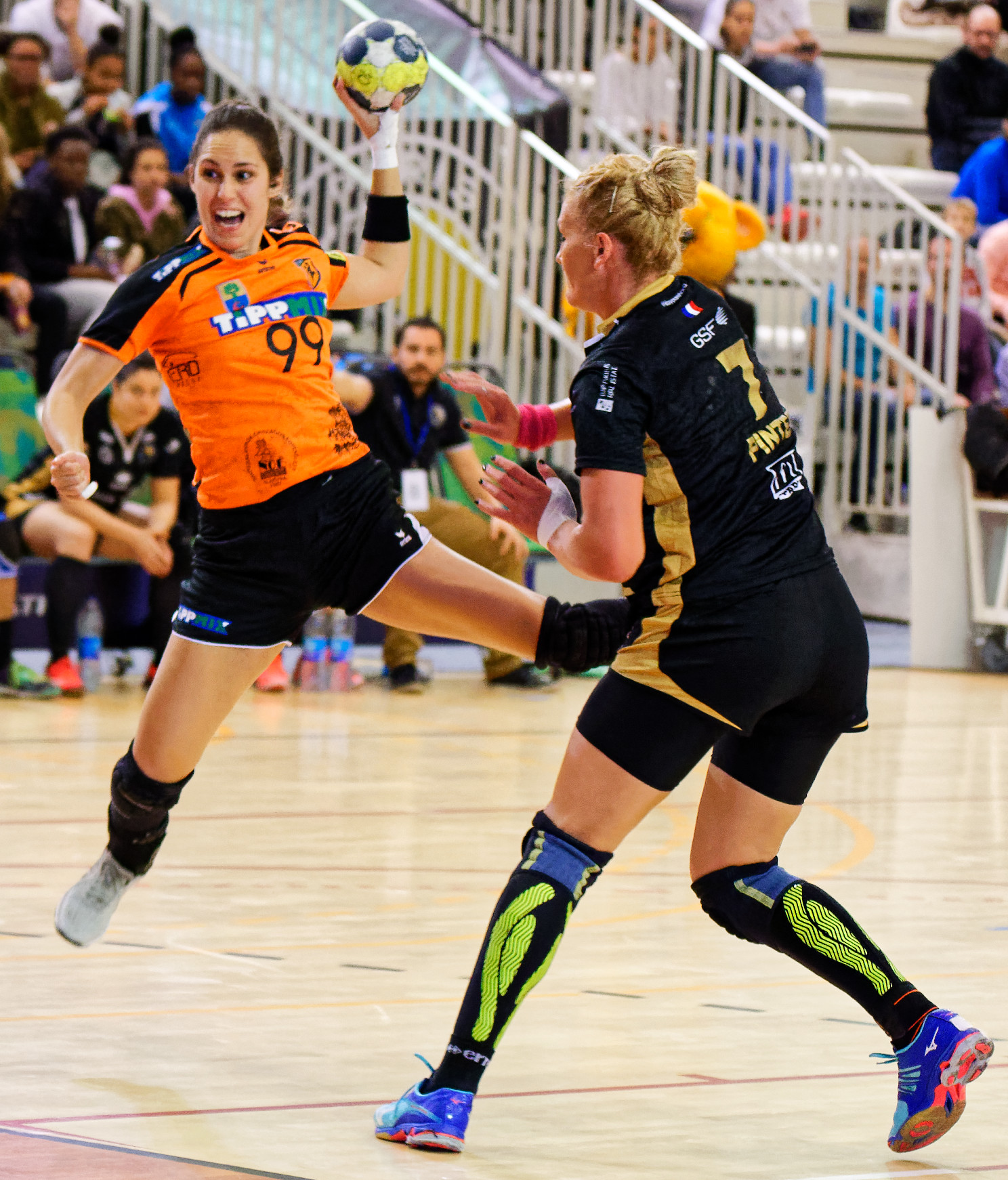 Rencontre retour du 3e tour de la coupe EHF, Issy Paris Hand / Erd. A Issy Les Moulineaux, le 18 novembre 2017.